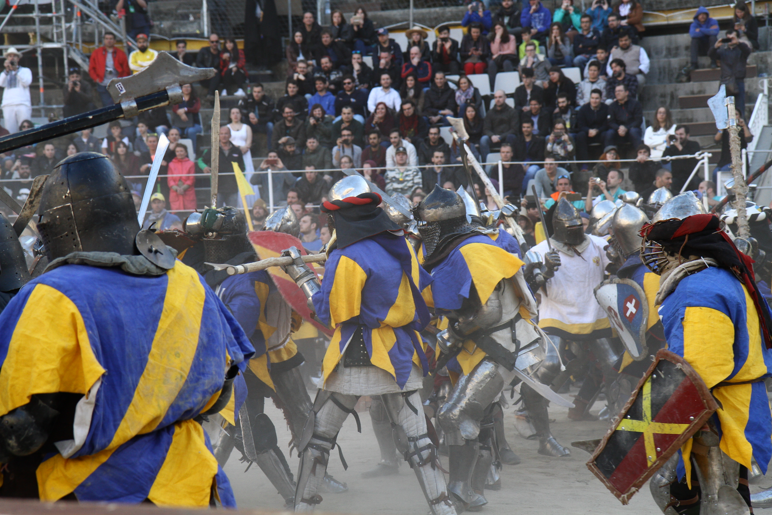 Массовые бои 21 на 21. Финал. Украина-Россия. Битва Наций - 2017. Барселона.